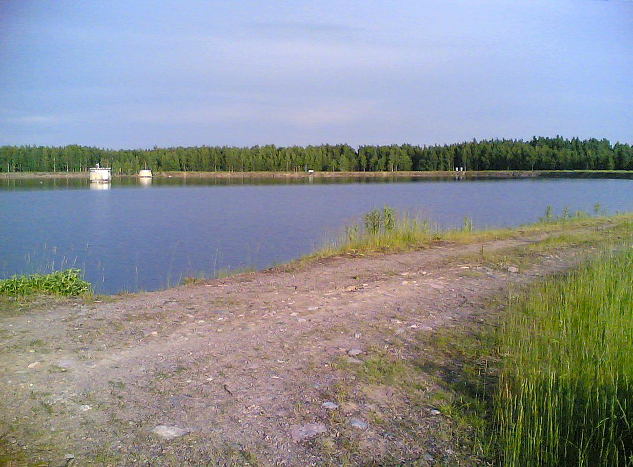 Silvolan tekojärvi.